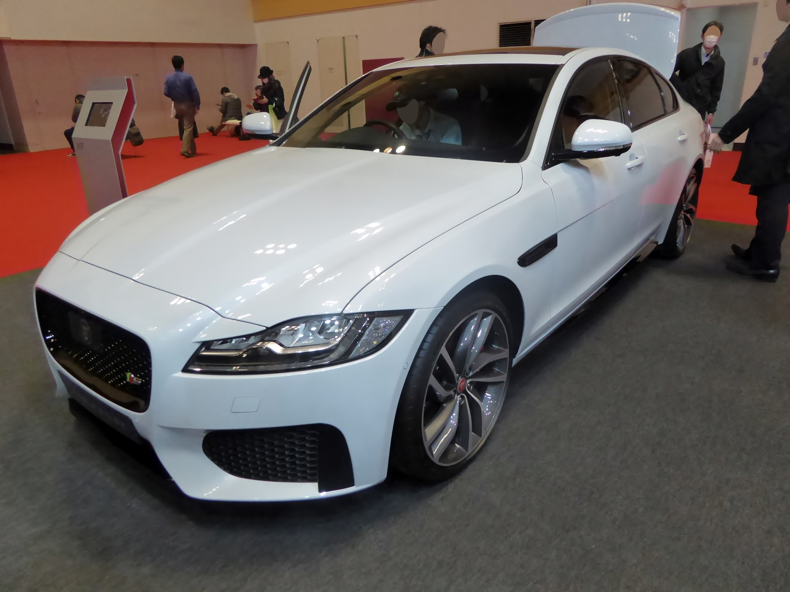 大阪モーターショー2015においてX260系ジャガー・XF Sを撮影。